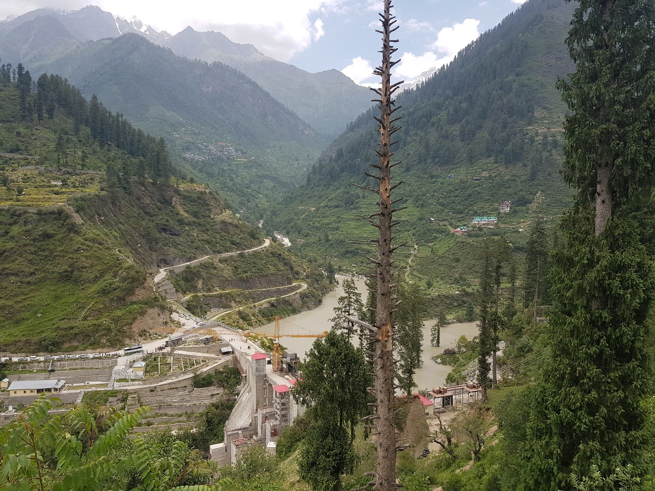 Bloqueador Natural de Gordura:Quitoplam Funciona? Conheça agora um produto revolucionáriopara bloquear a gordura em seu corpo naturalmente. Estamos falando sobre o inovador Quitoplam Funciona, um produto que já é recomendado por médicose nutricionistas em mais de 44 países. Quitoplam é um bloqueador natural de gordura, em sua fórmula são encontradas fibras potentes que absorvem e eliminam a gordura do seu corpo, acelerando seu metabolismo, controlando o seu apetite, regulando seu intestino e ainda reduzindo os níveis de colesterol. Além de saber desses benefícios sobre QuitoplamFunciona, o produto está sendo recomendado por centenas de médicos peloBrasil pelo seguinte motivo: Quitoplan recebeu o selo de garantia da Anvisa e Ministério da Saúde, portanto, é seguro e funciona!